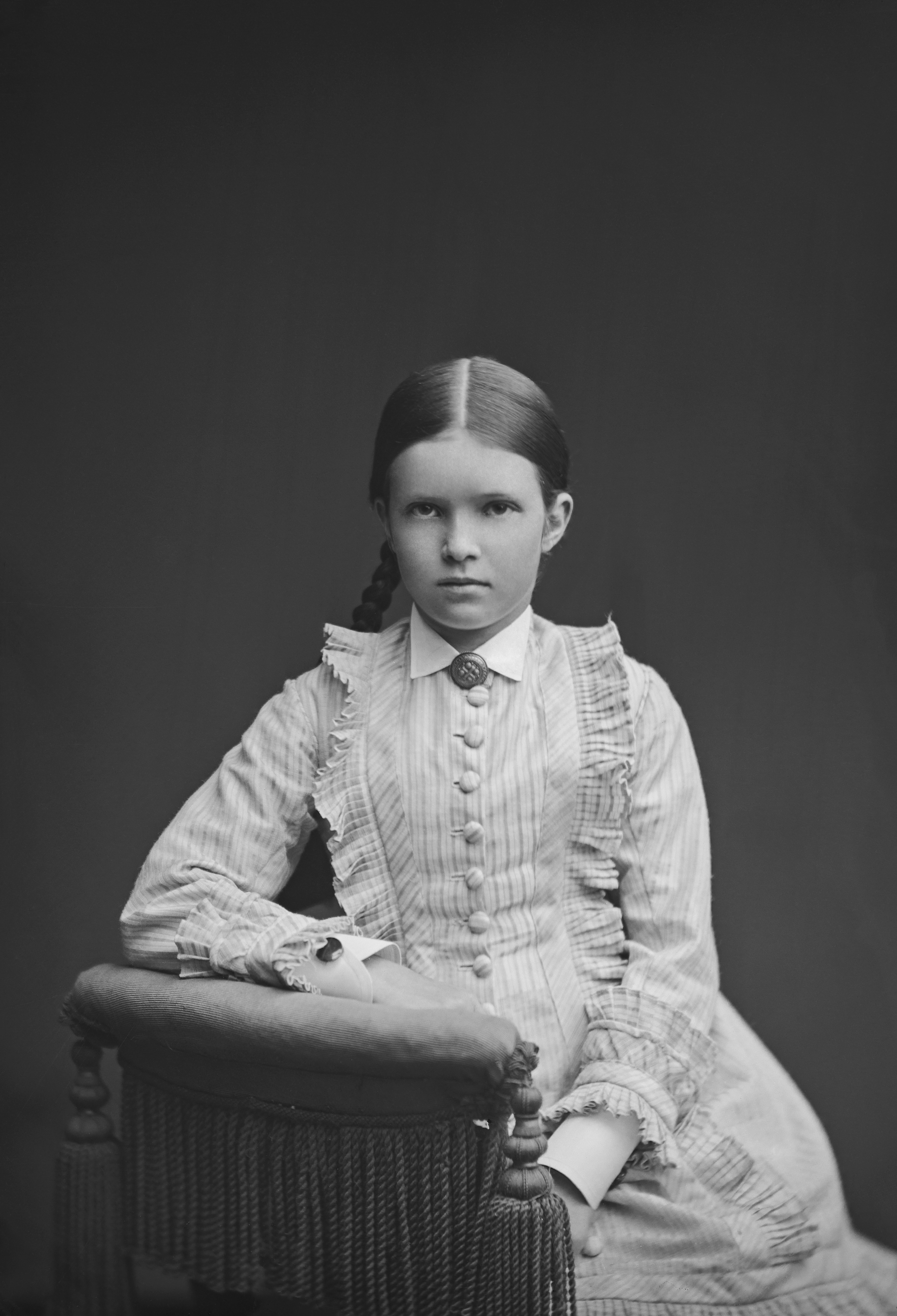 Nanny Lagerborg 1878 (gift Cedercreutz)